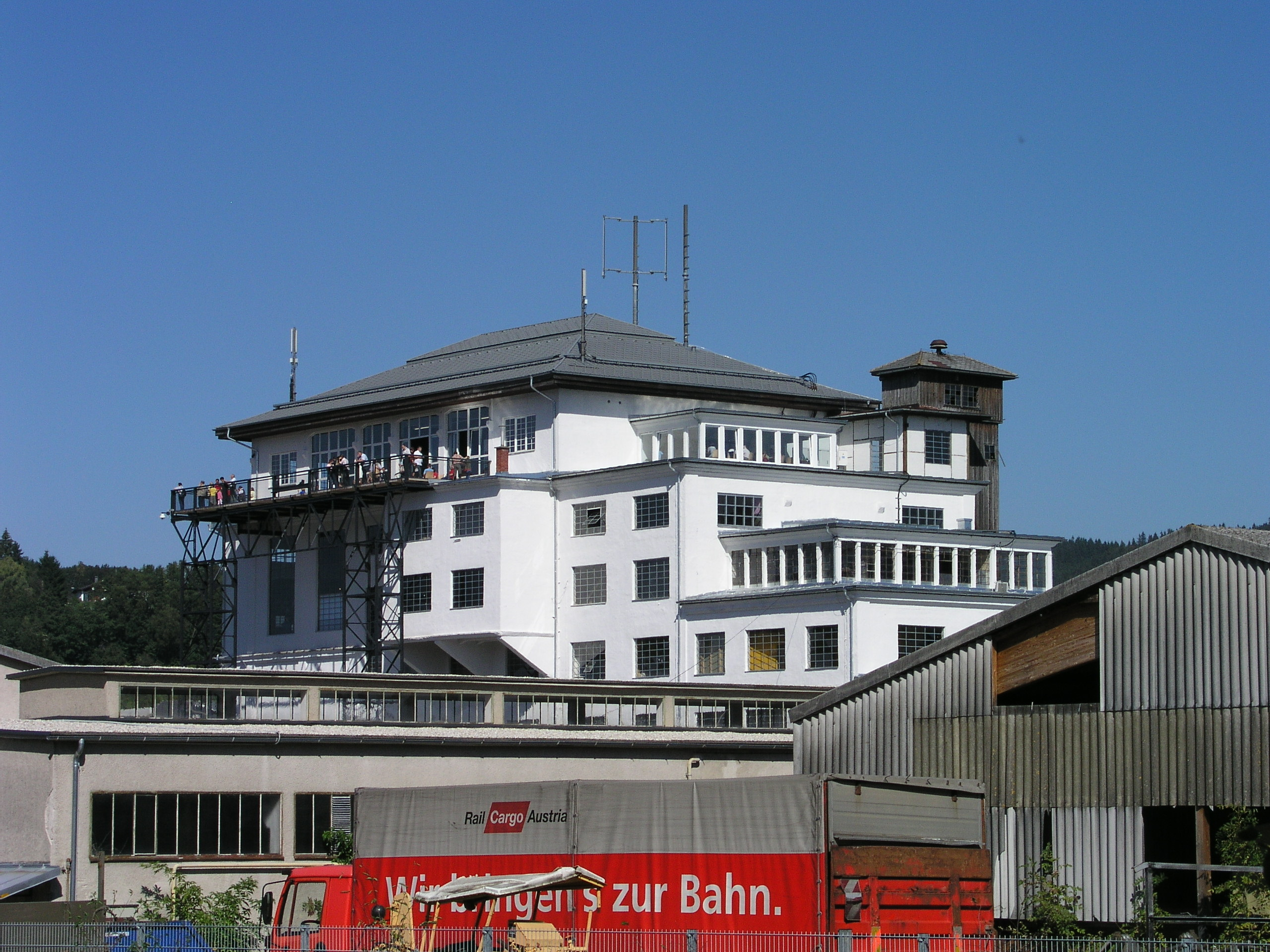 Zentralsortierungsanlage der Wolfsegg-Traunthaler-Kohlewerks-AG